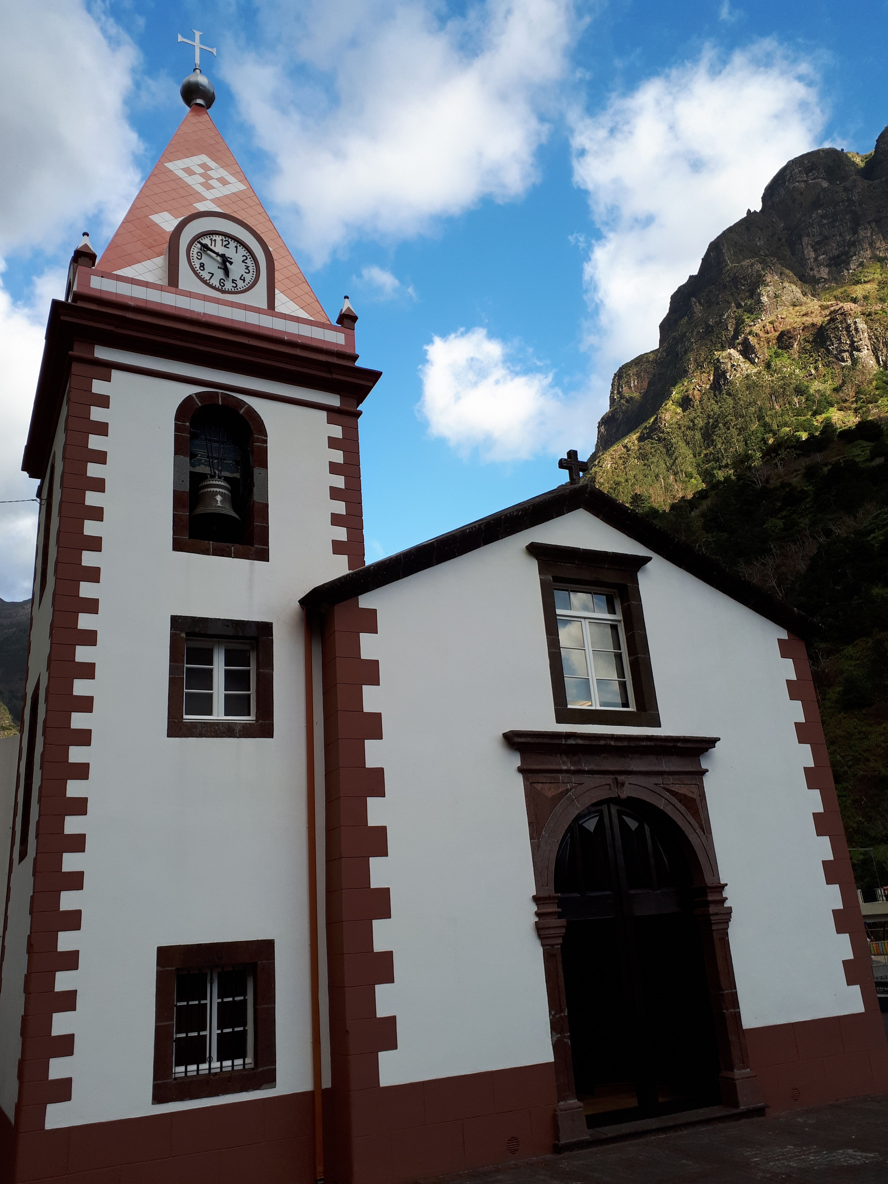 É uma igreja do Século XVI. Com azulejos típicos portugueses.